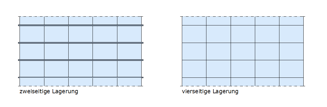 Diese Grafik zeigt die zweiseitige und vierseitige Lagerung von SG-Fassaden